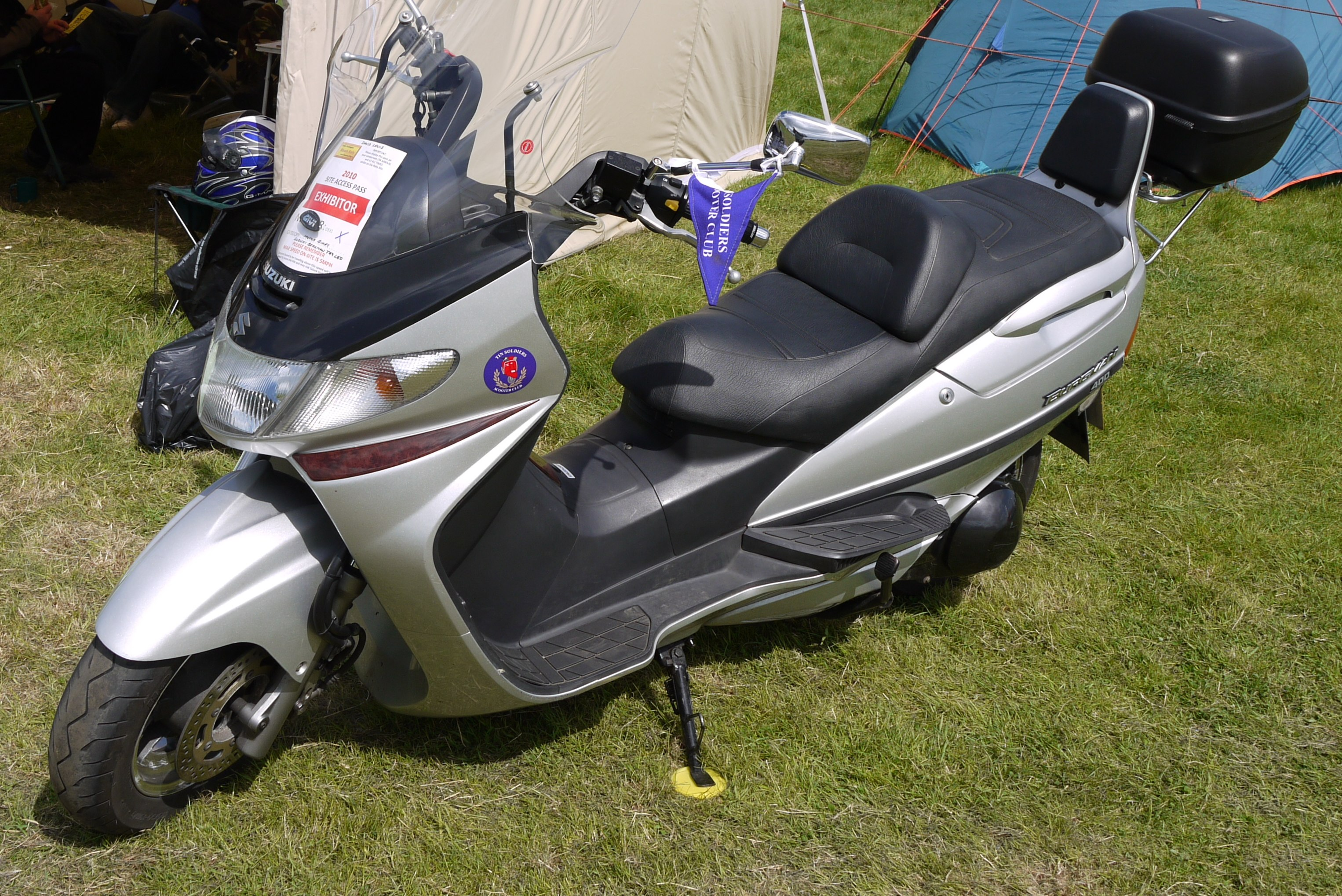 Panasonic G1 14-45 Lens